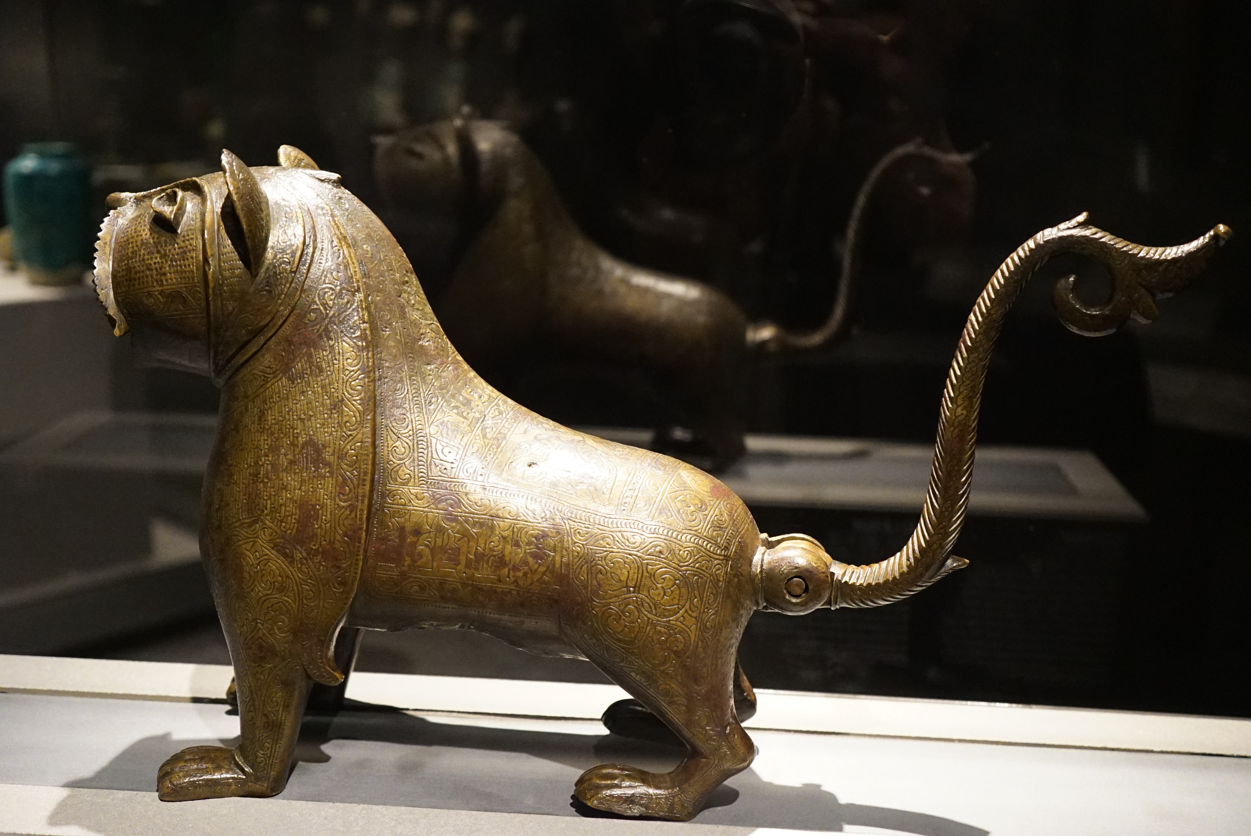 vue du Lion de Monzon.